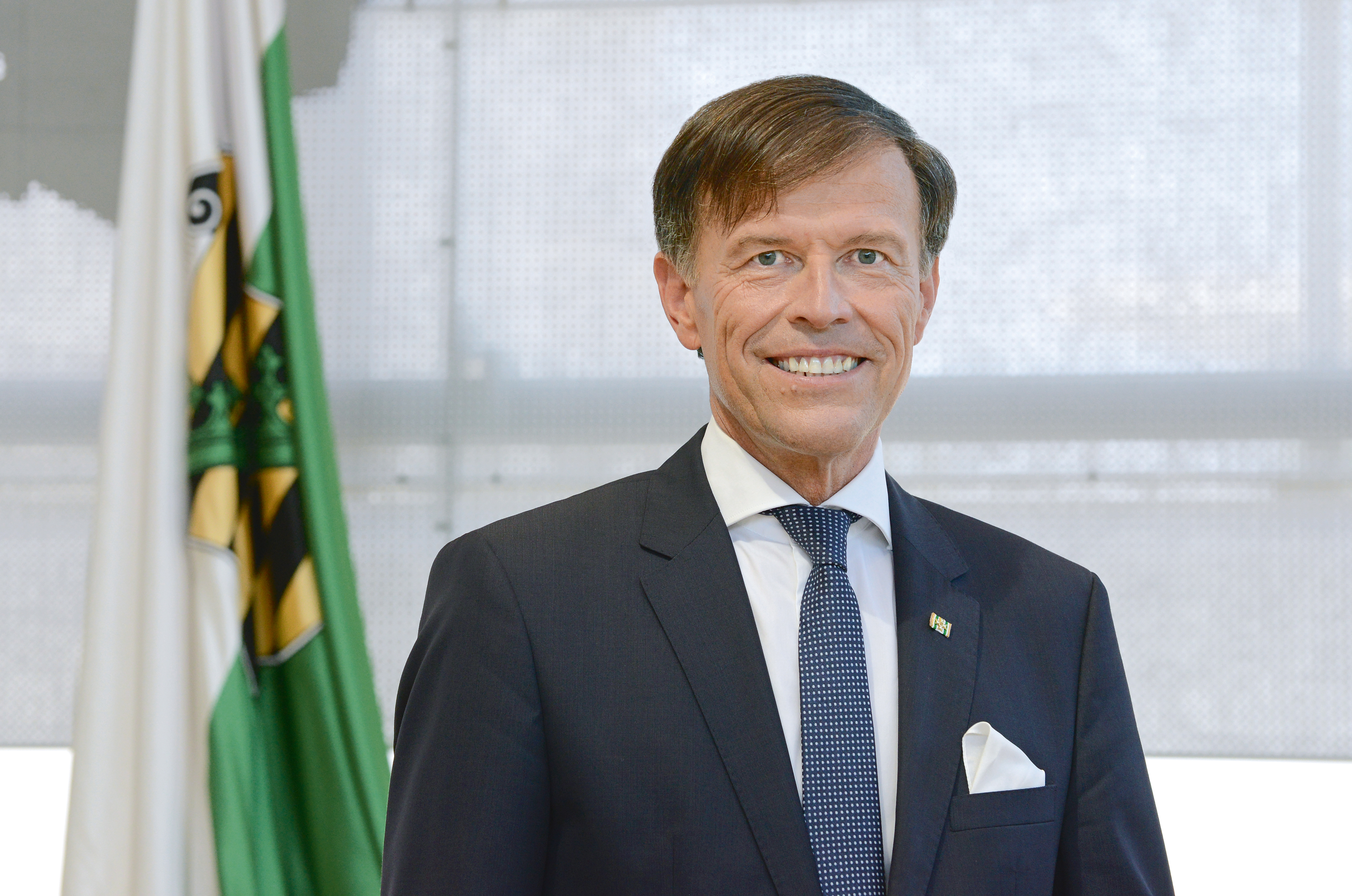 Landtagspräsident Dr. Matthias Rößler, 2015